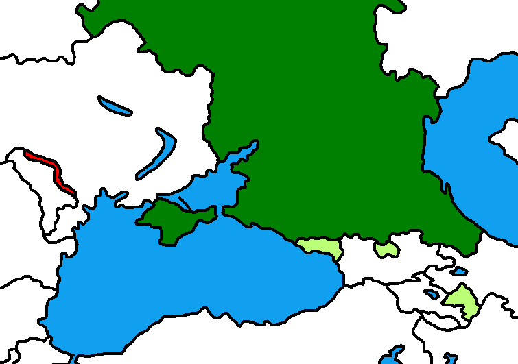 Os países que reconhecem ou comercializam com a Pridnestróvia/Transnístria.